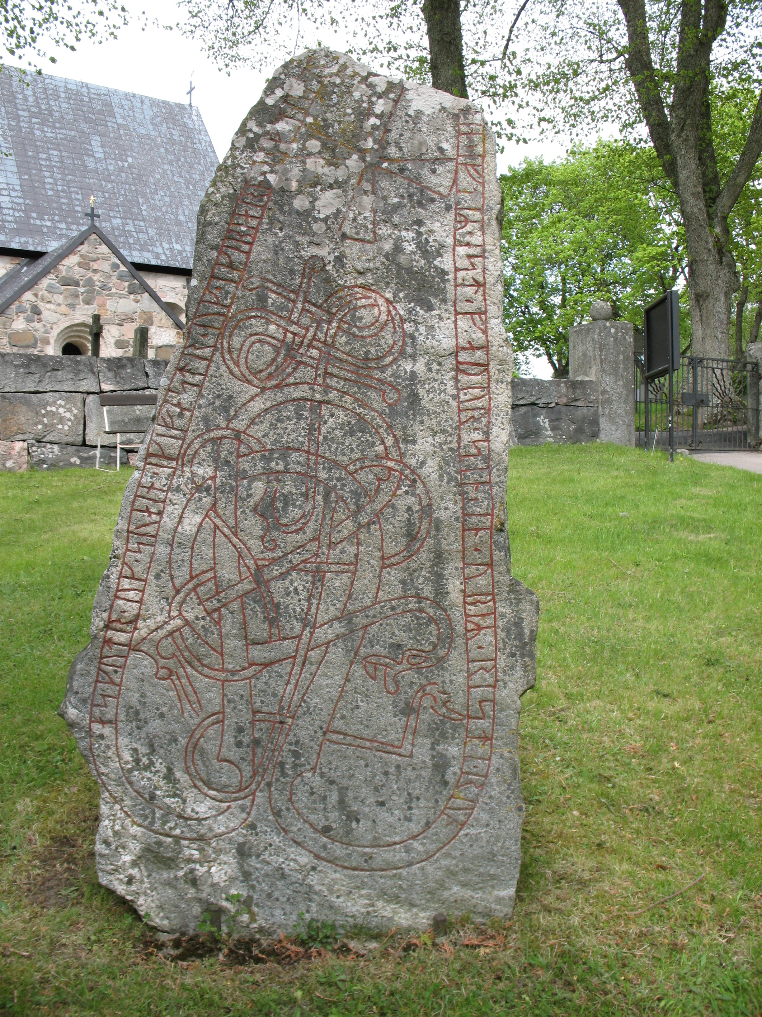 Runstenen U 181 vid Össeby-Garns kyrka.